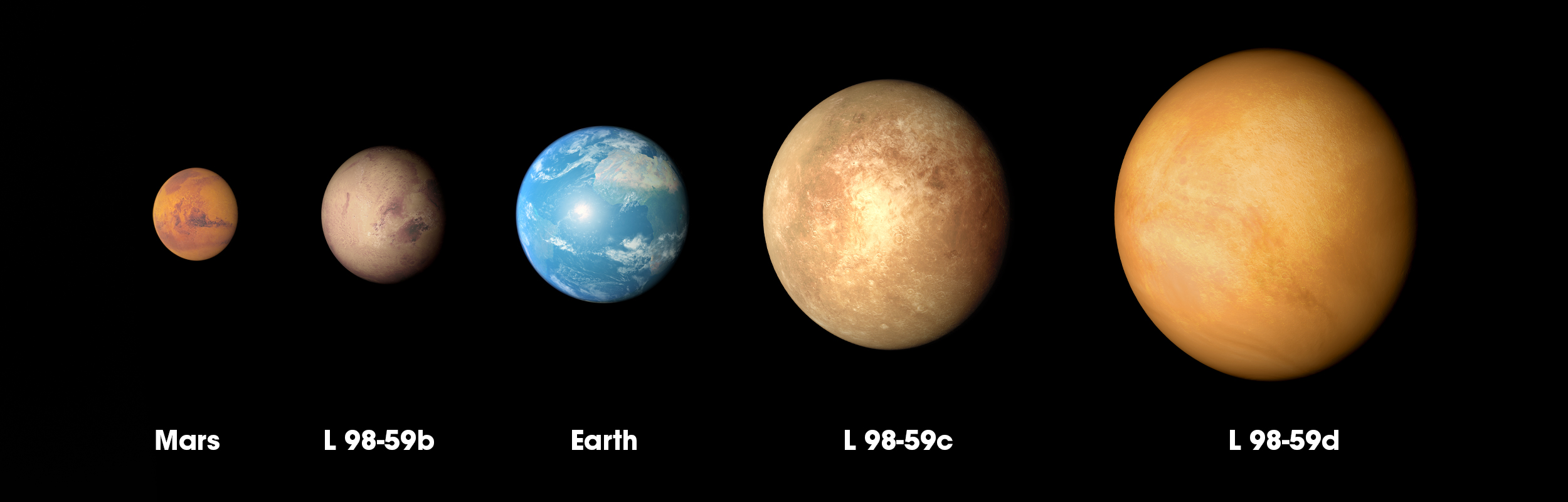 Comparaison des planètes du système L98-59 avec Mars et la Terre.